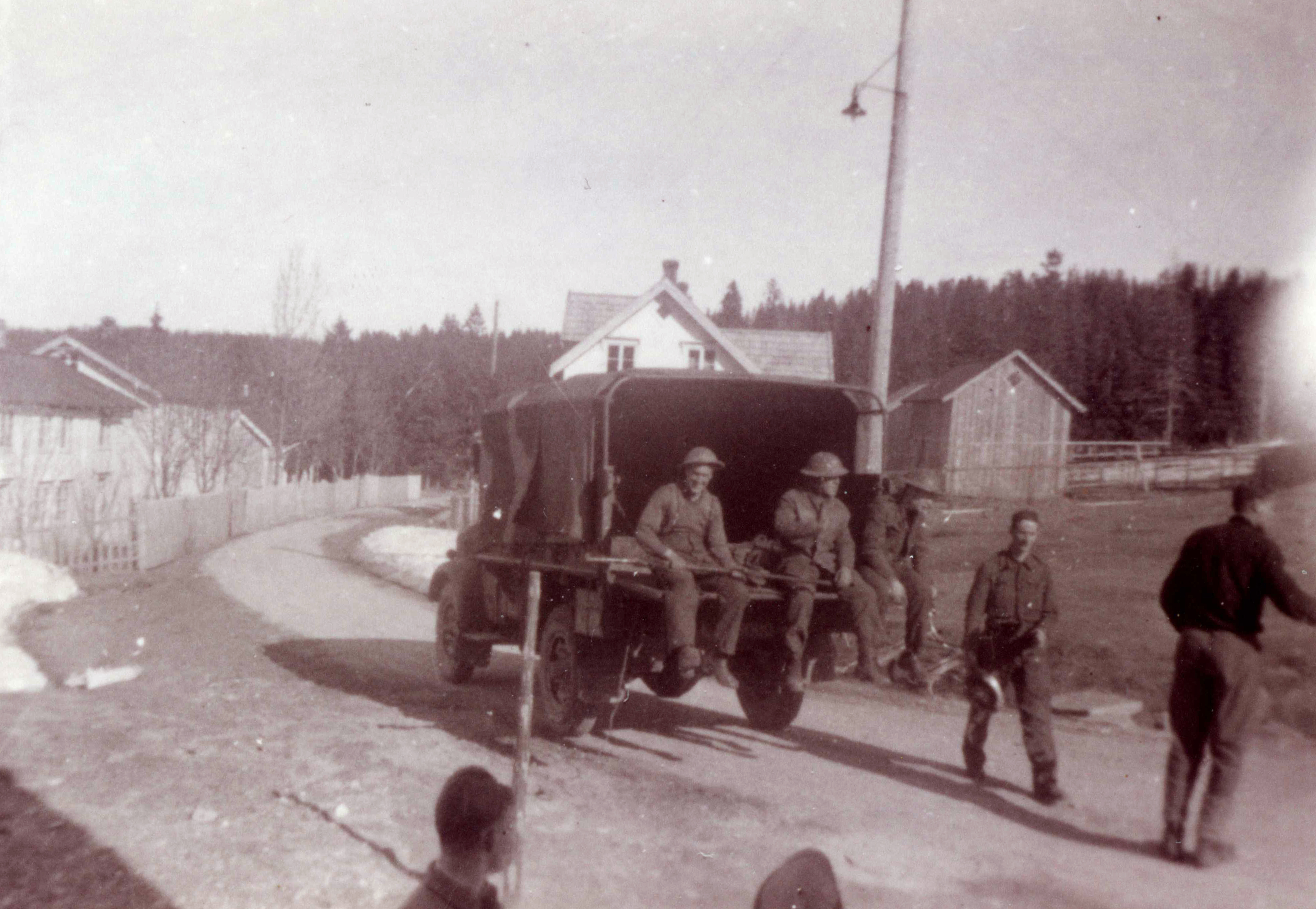 Engelske soldater ved Mo eller Hemnes Tittel / Title: Engelske soldater Mo eller Hemnes? Dato / Date: Ukjent/Unknown Fotograf / Photographer: Ukjent/Unknown Sted / Place: Ukjent/Unknown Eier / Owner Institution: Arkiv i Nordland Lenke / Link: Arkiv i Nordland Arkivreferanse /Archive reference: AIN.NA143.0136 Fra Dag Skogheims Privatarkiv Tekst bak på bildet: Englischer beutefilm 1940 mai, Tommys auf auto sitzen in Mo oder Hemnes oder Mosjöen? Rognan? Bergjeger Rudi Margreiter forteller: Etter kampene ved Stien, sør for Mo I Rana. 17. mai 1940, hadde en av de engelske krigsfangene et Fotoapparat. Rudi tok filmen med, og fikk fremkalt bildene. Dette bildet kan være fra denne filmrullen. Gebirgsjäger Rudi Margreiter says: After fighting at Stian, south of Mo i Rana at the 17th of May 1940, one of the English POWs had a camera. Rudi took the film with, and got the pictures developed.